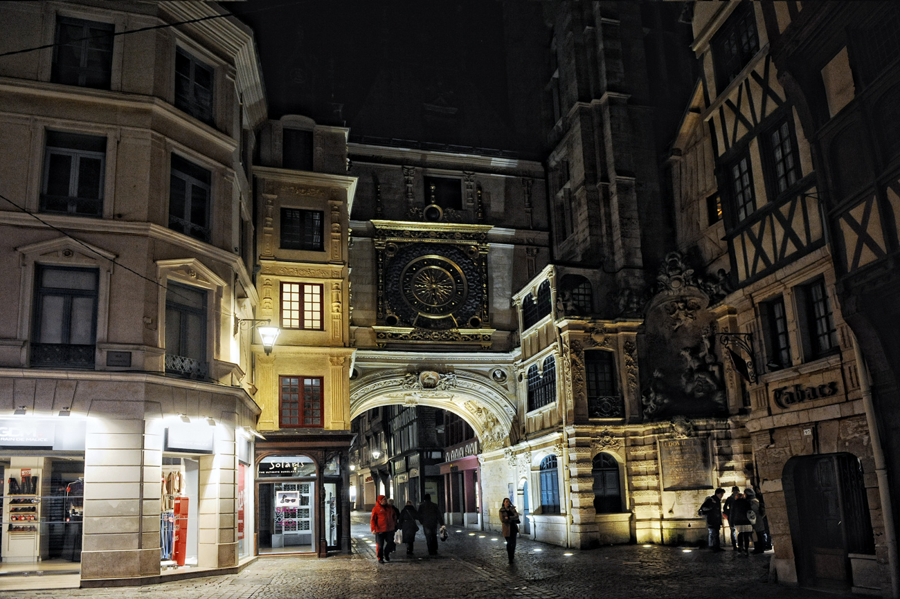 Rue du Gros Horloge 2012